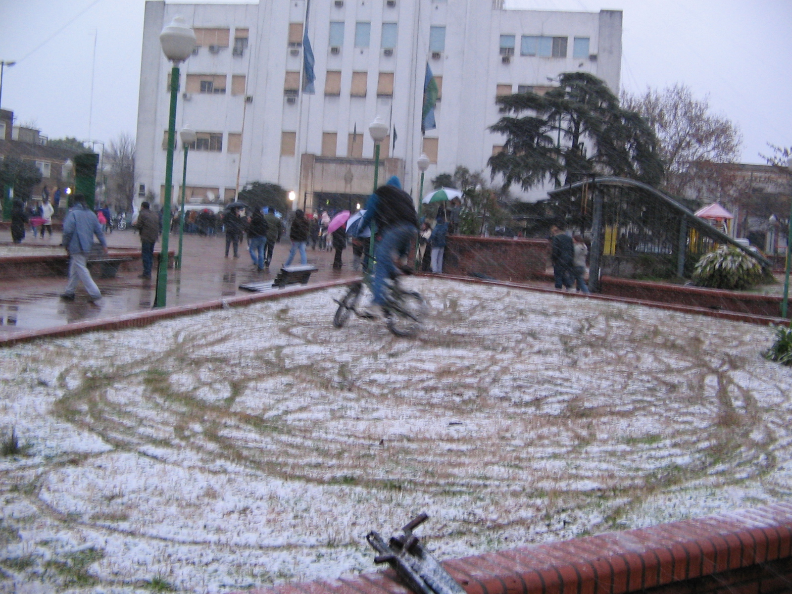 Plaza Grigera, en el centro de Lomas de Zamora, durante la histórica nevada del 9 de julio de 2007. En el fondo se ve el edificio de la Municipalidad.